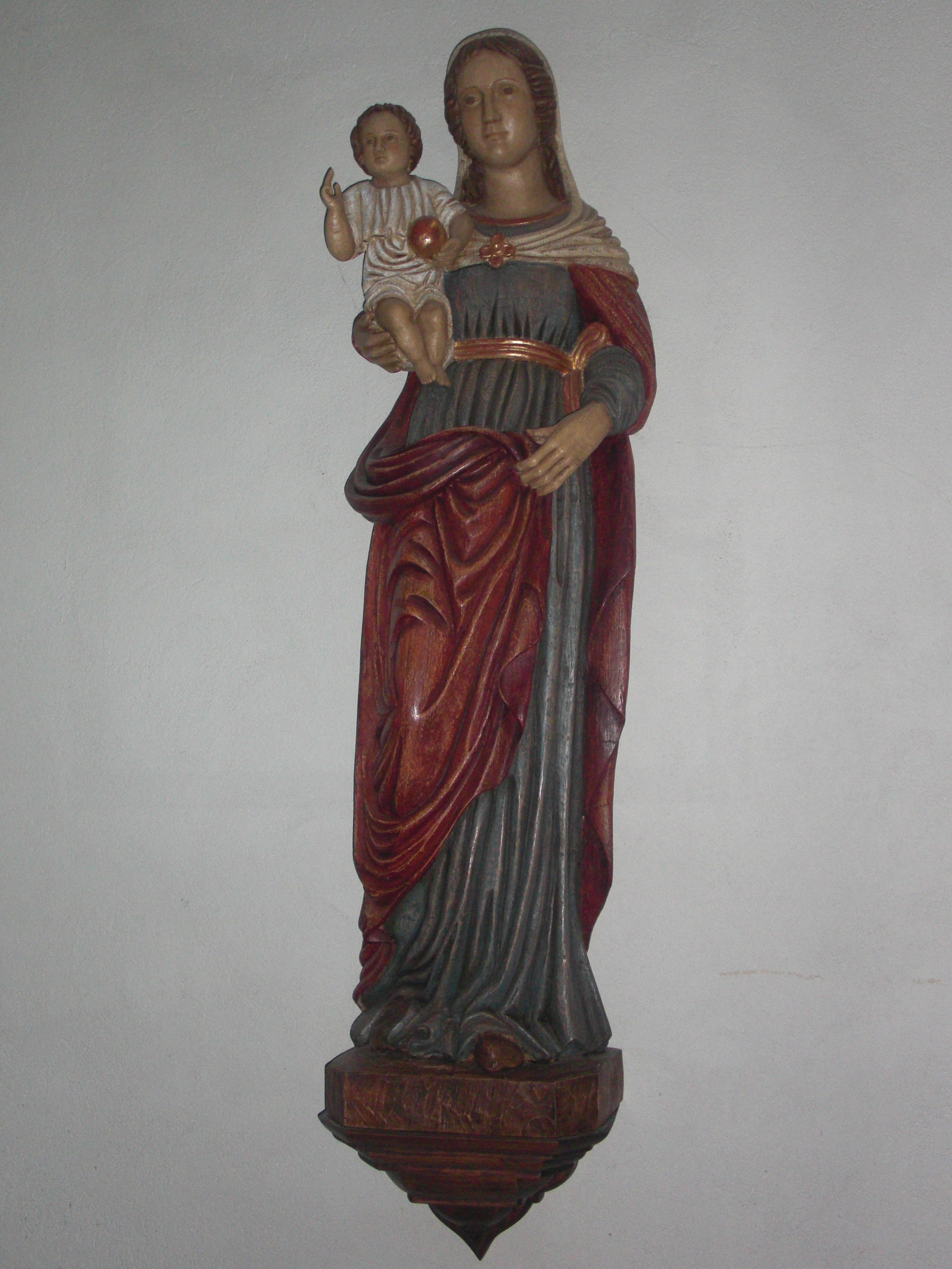 Vierge à l'enfant dans l'église Saint-Léger de Saint-Germain-en-Laye, 17 avril 2013